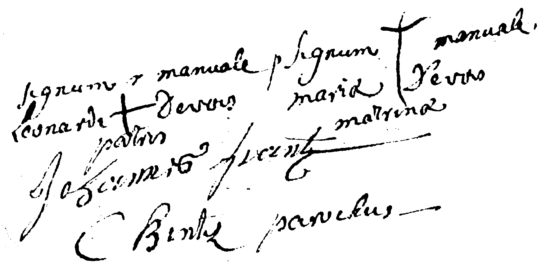 Eintrag einer Taufe in einem Kirchenbuch, bei dem die schreibunkundigen Eltern ein Kreuz als Handzeichen machten; die Unterschrift des Pfarrers beglaubigte die Unterschriften.